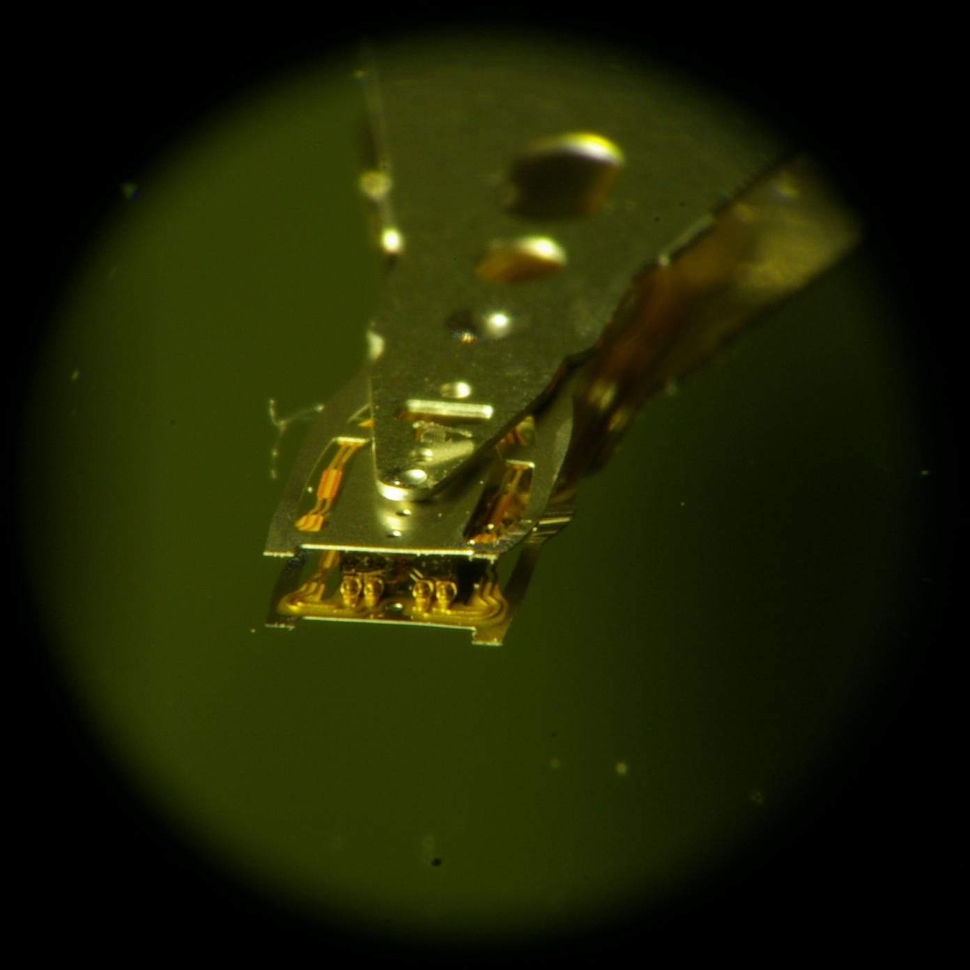 Mikrofotografia przedstawiająca głowicę dysku twardego, na zdjęciu widoczny też mikroskopijny kurz.